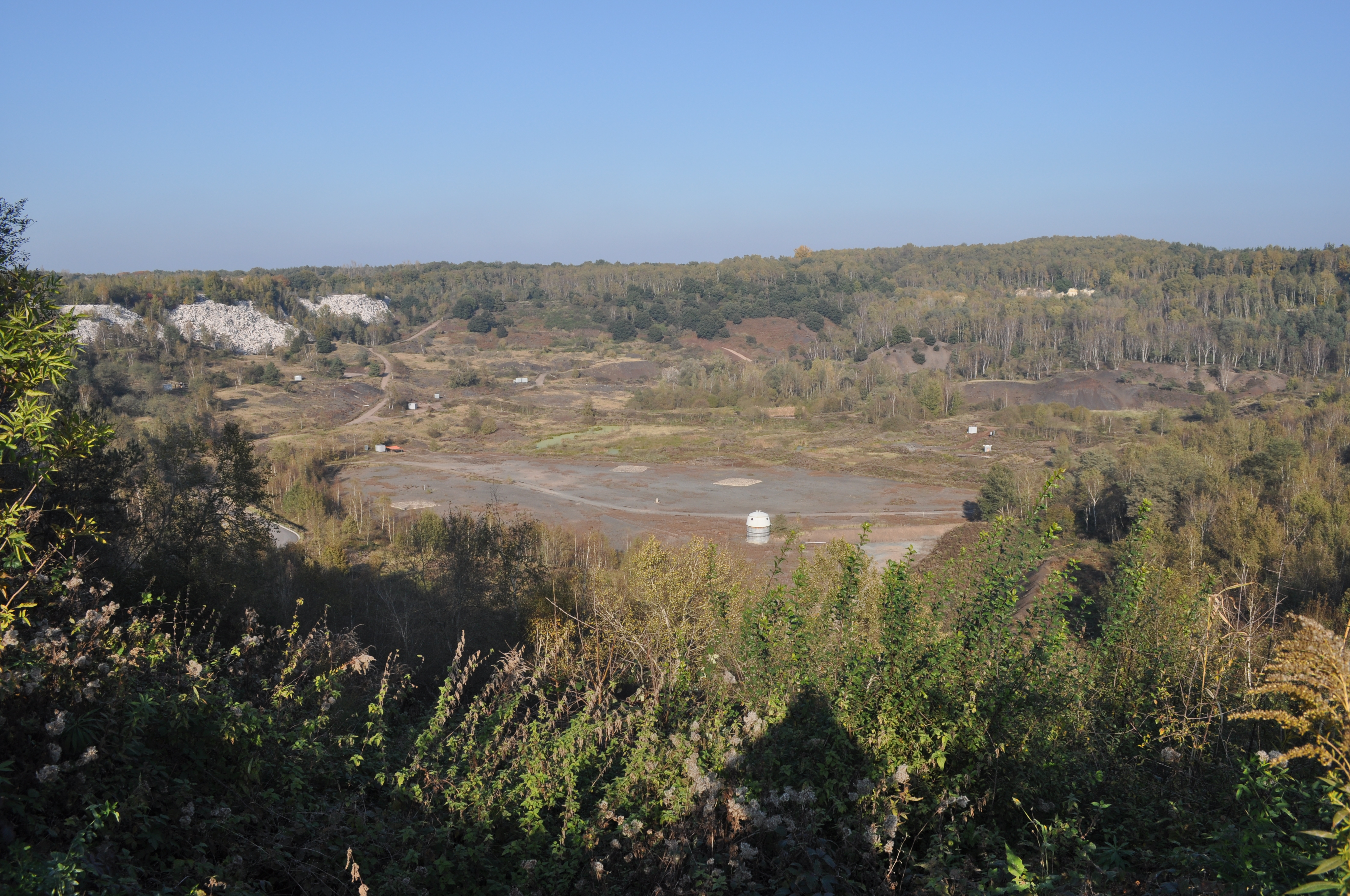 Vista panorámica del yacimiento de fósiles de Messel.